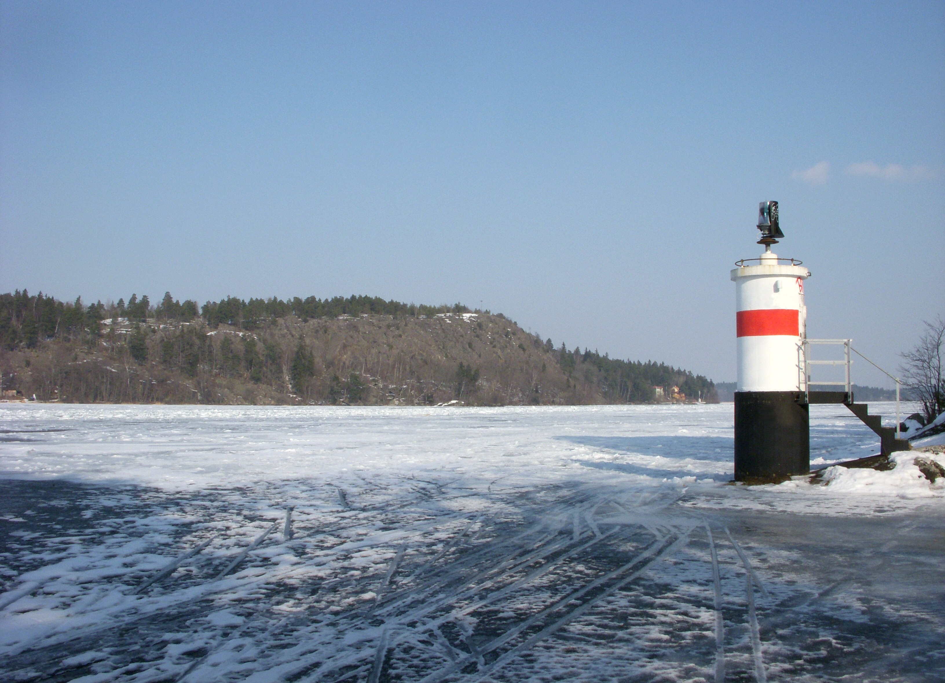 Sätraskogens naturreservat, ön Kungshatt och Sätra fyr